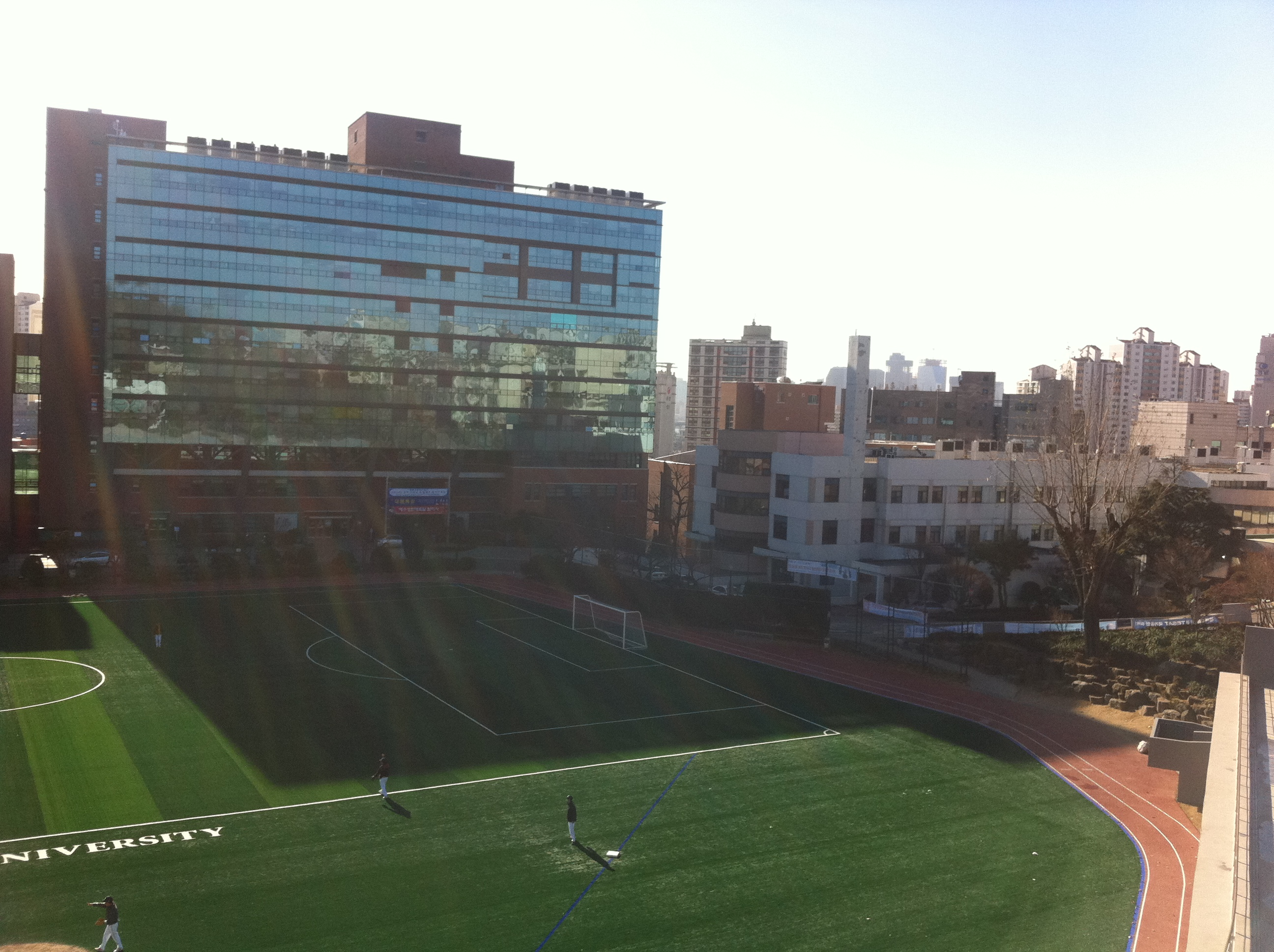 서강대학교 운동장 위 #6